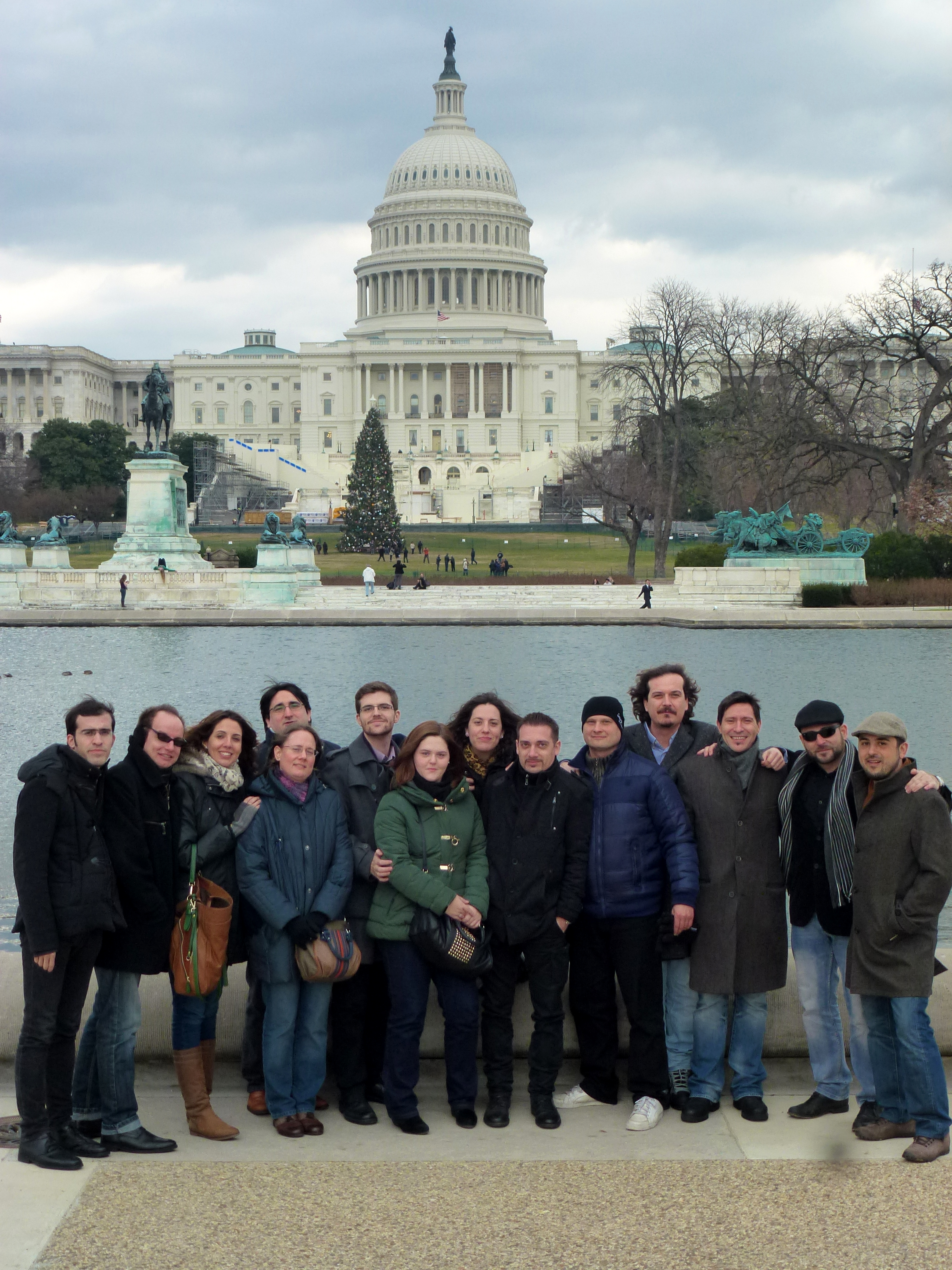 Pose de la orquesta ante el Capitolio de Washington